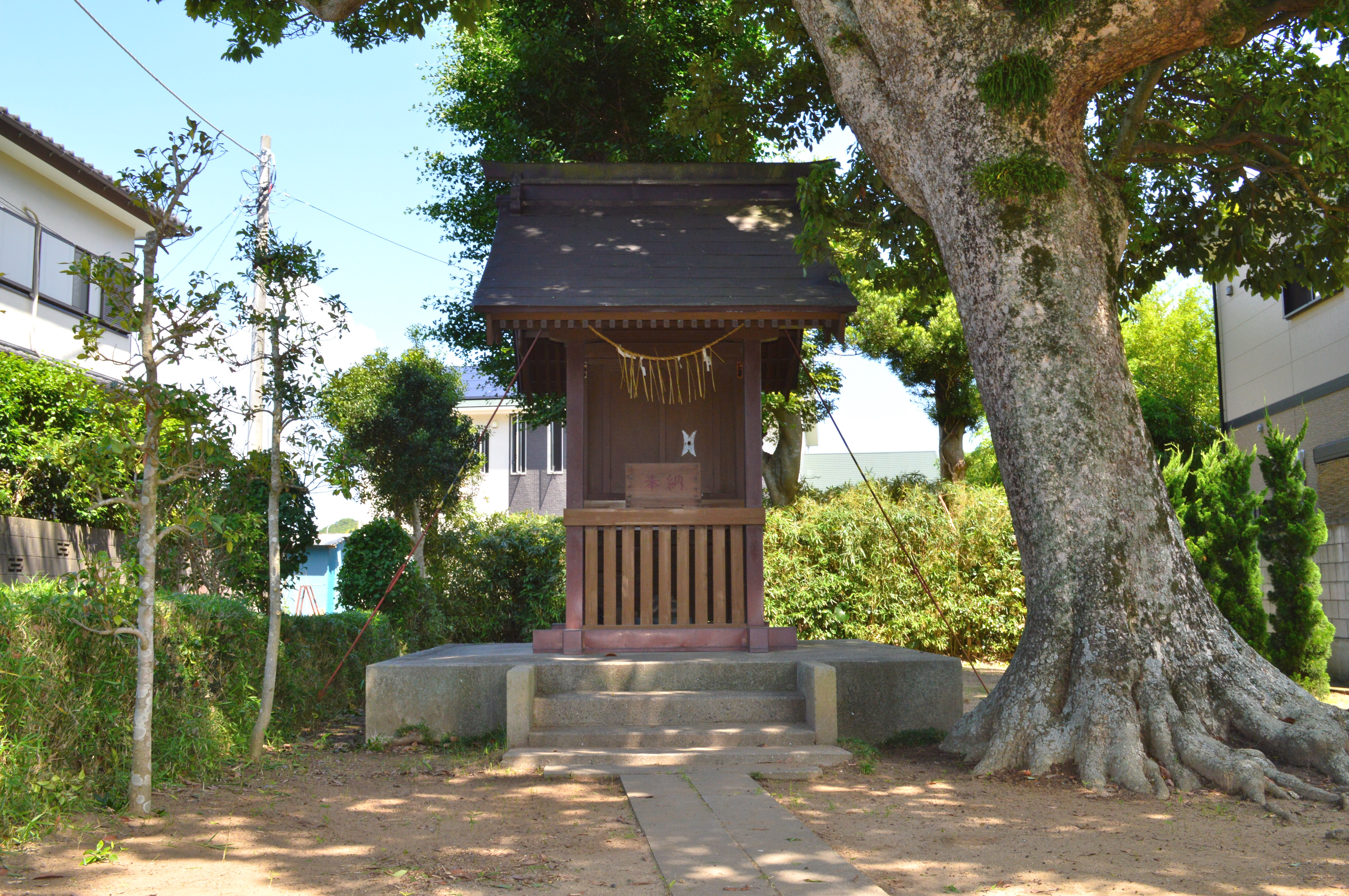 鎌足神社 (藤原鎌足出生伝承地) 本殿